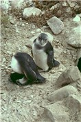 Jackass pinguïn